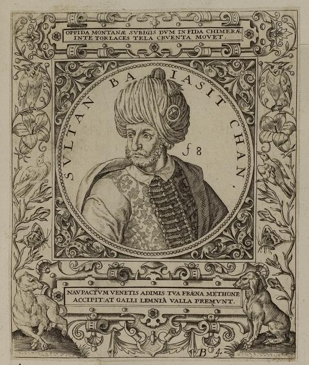 Grafik aus dem Klebeband Nr. 1 der Fürstlich Waldeckschen Hofbibliothek Arolsen Illustration aus: Georg Greblinger: Wahre Abbildungen der Türckischen Kayser vnd Persischen Fürsten / so wol auch anderer Helden und Heldinnen von dem Osman / biß auf den andern Mahomet. Johann Ammon, Frankfurt 1648 Motiv: "Sultan Baiasit Chan" (Bayezid II.)